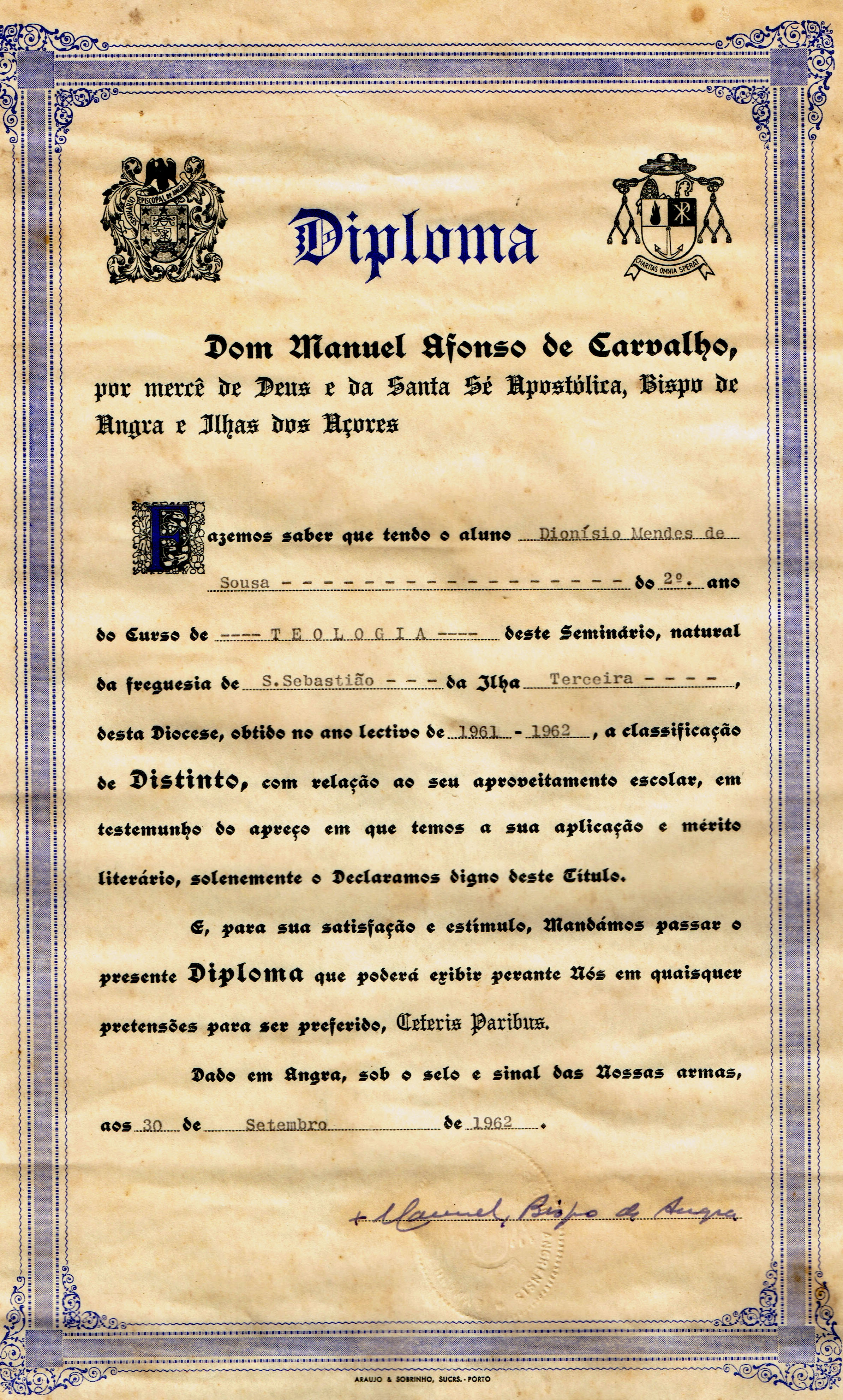 velhas glórias